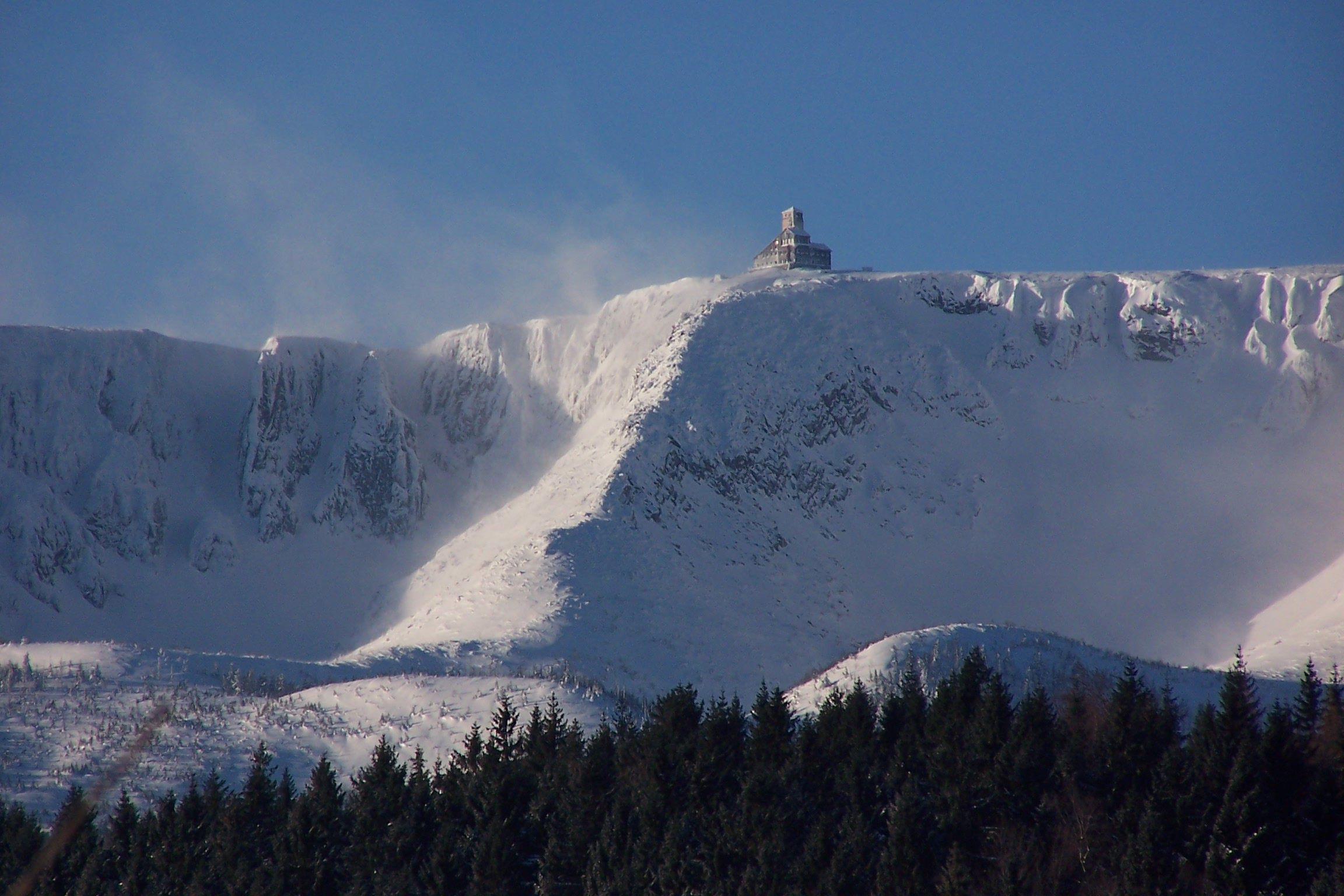 Śnieżne Kotły